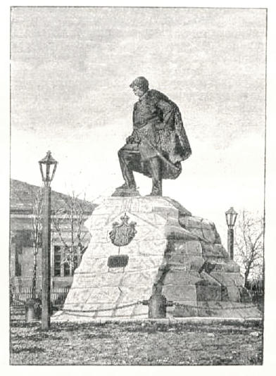 Данное изображение было использовано в статье «Аргутинский-Долгоруков, Моисей Захарович, князь» опубликованной в третьем томе «Военной энциклопедии», который был издан книгоиздательским товариществом Ивана Дмитриевича Сытина в 1911 году в столице Российской империи городе Санкт-Петербурге.